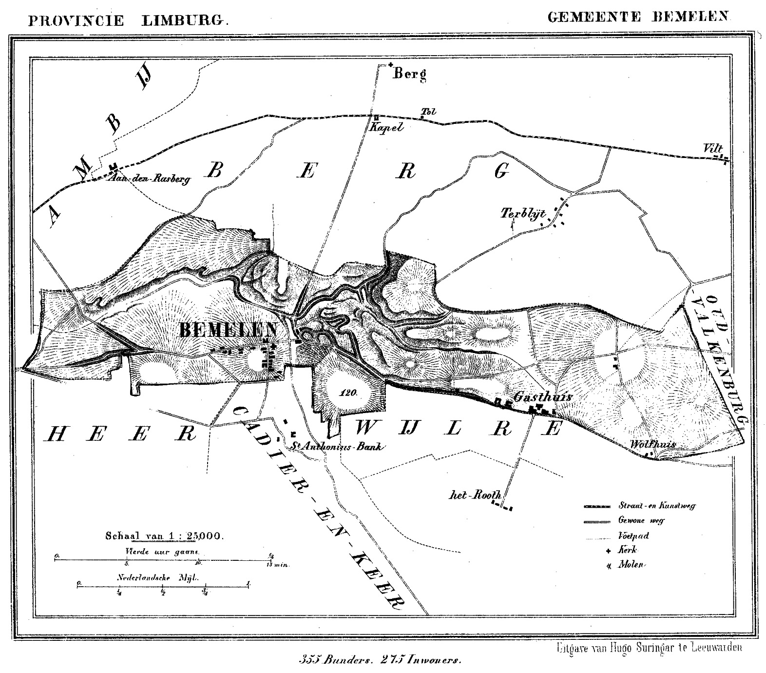 Kaart uit 1866 van de voormalige gemeente Bemelen (prov. Limburg).